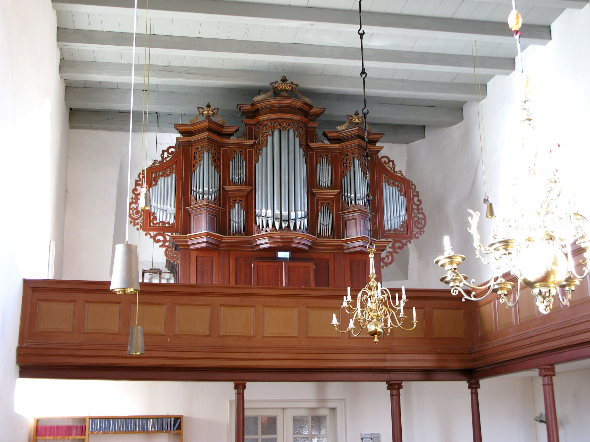 Orgel in Werdum, Landkreis Wittmund